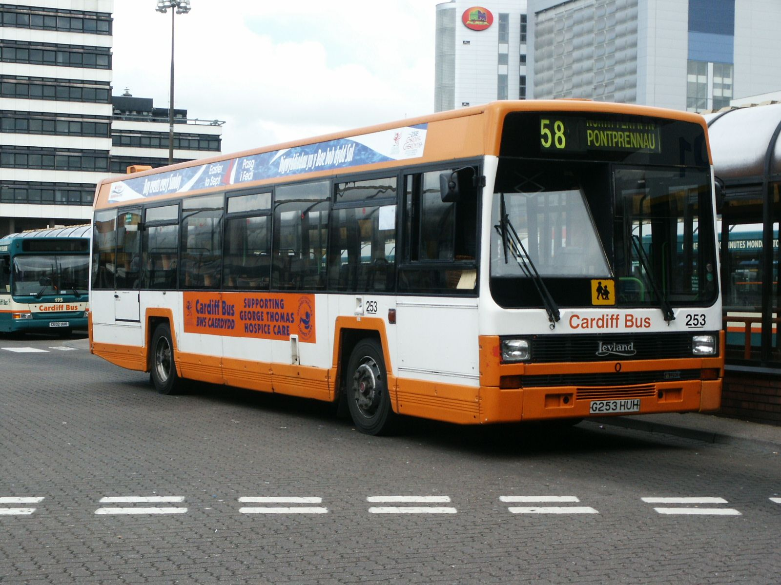 G253EUH 240602 CPS